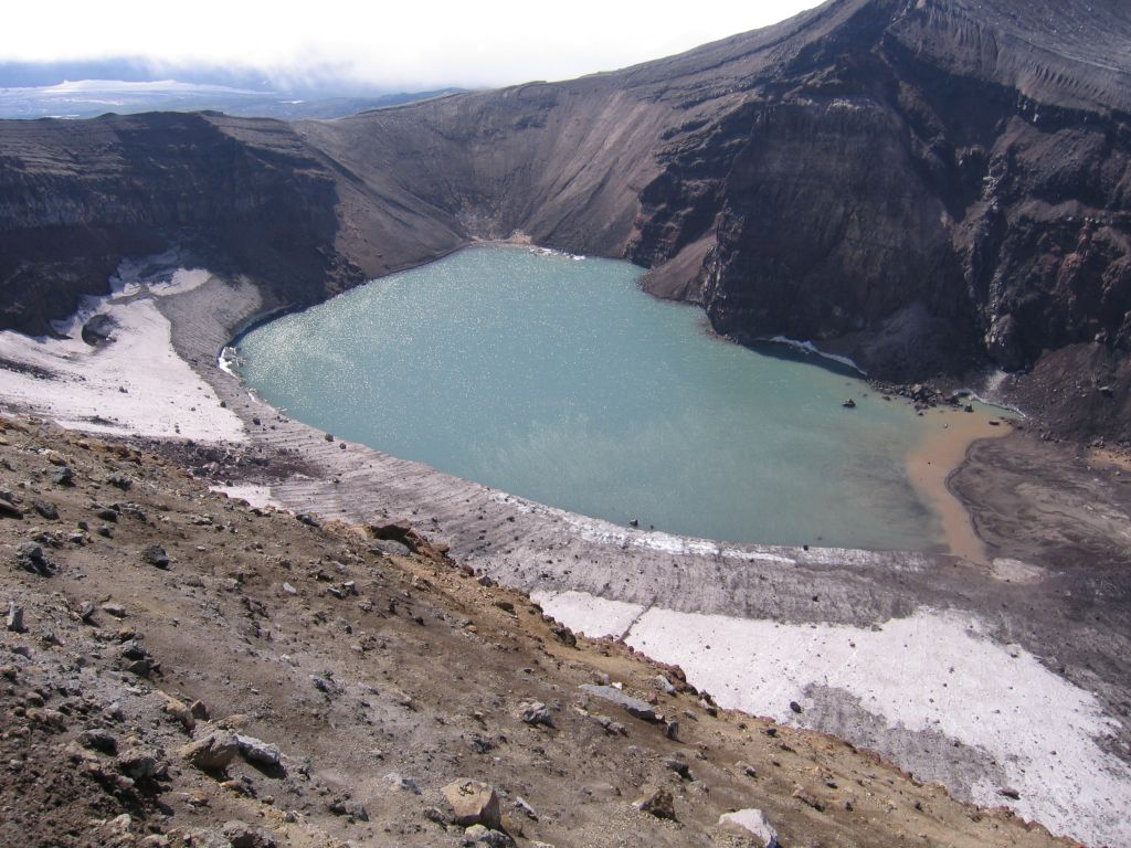 Кравулкана Горелый